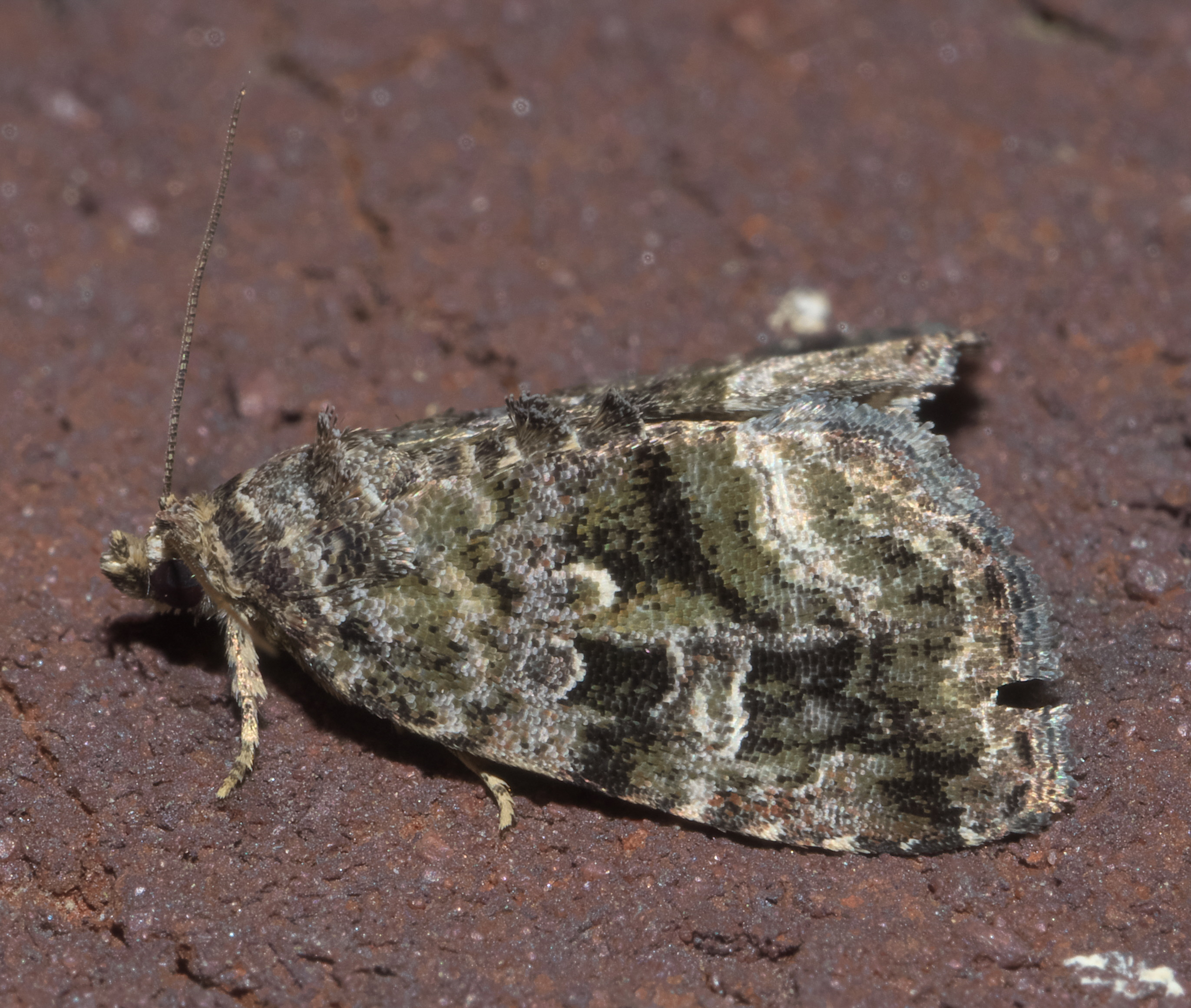 Protodeltote muscosula, Large Mossy Lithacodia - Hodges #9047, ID Confidence: 90